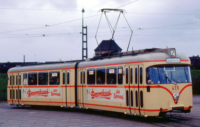 Straßenbahn Bremen, Wagen Nr. 419 (Hansawagen Typ GT4a) am Sonntag, den 18. Mai 1963 in der Wendeschleife Gröpelingen